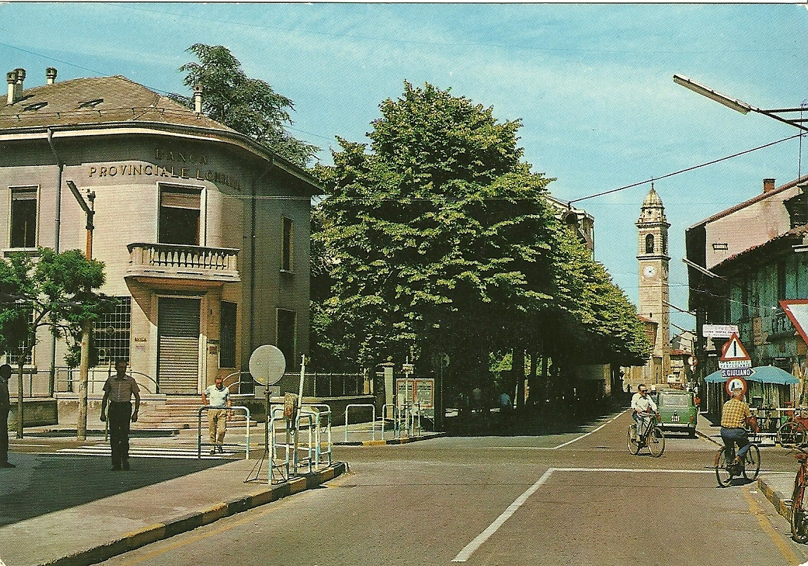 Locate : incrocio via Roma,via Diaz, via Giardino.